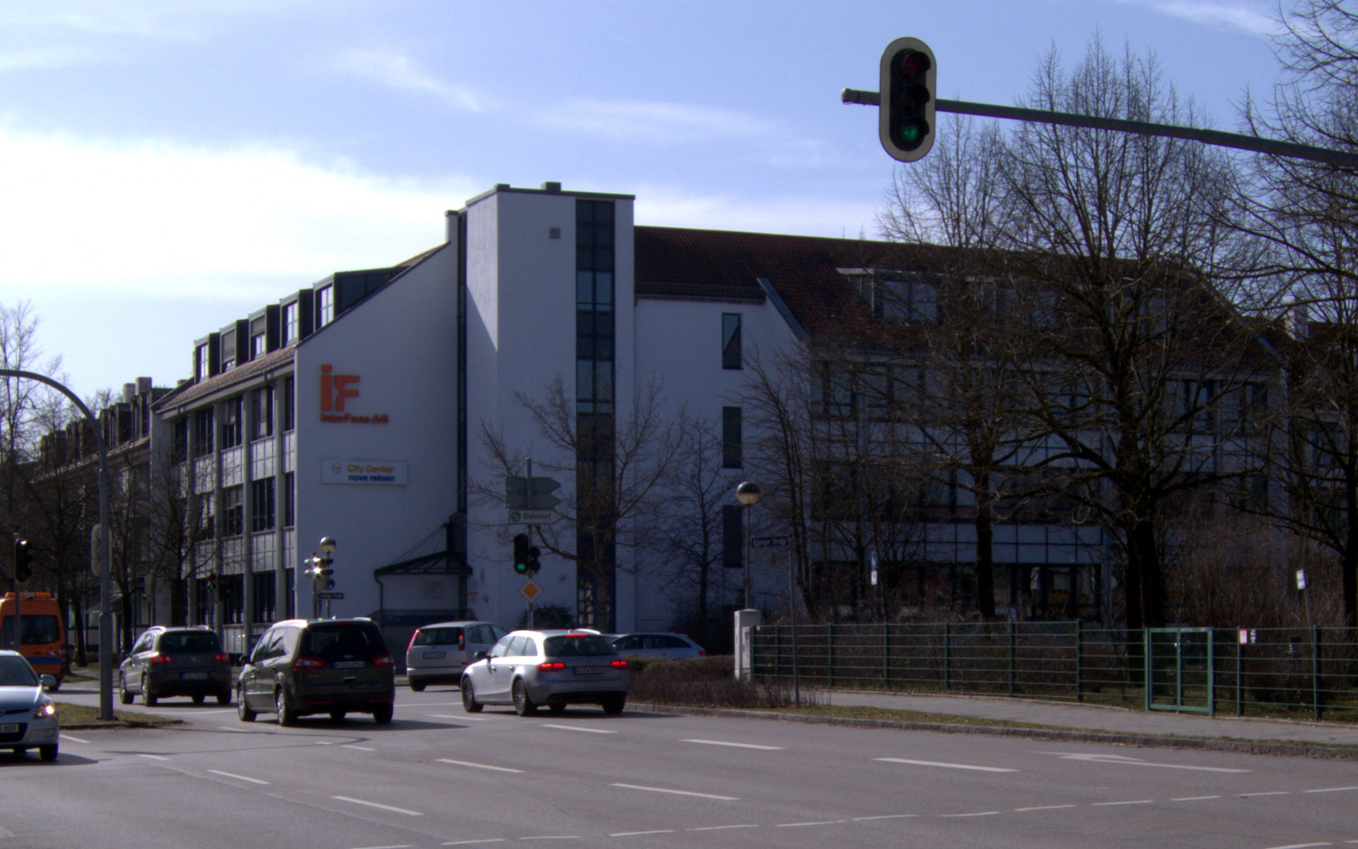 Firmengebäude Biberger / Leipziger Straße Ansicht aus Nord